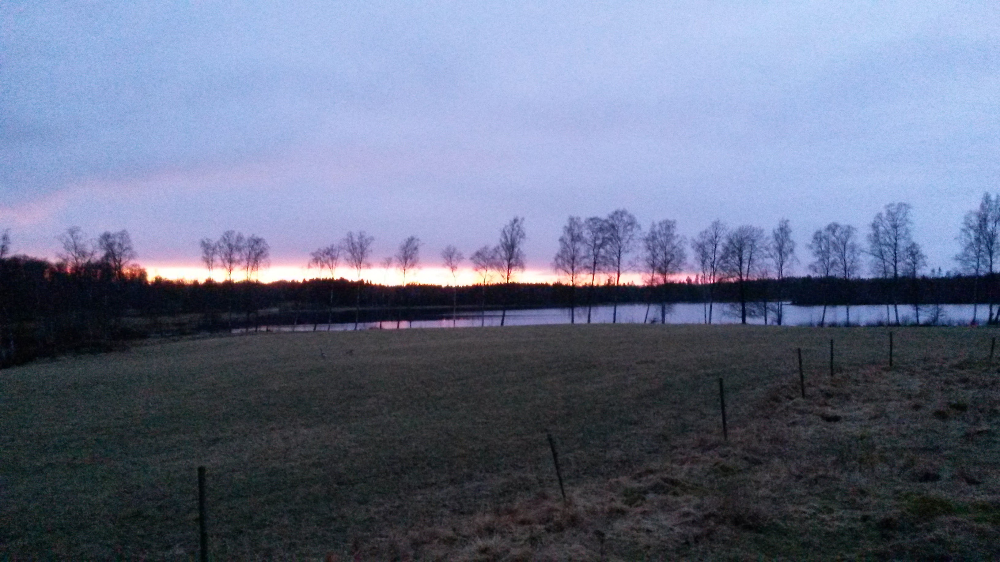 Sandsjön, Sandsered, söderifrån 27 mars 2016, solen är på väg ned.